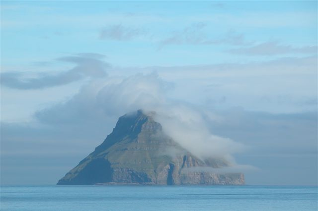 Lítla Dímun in september